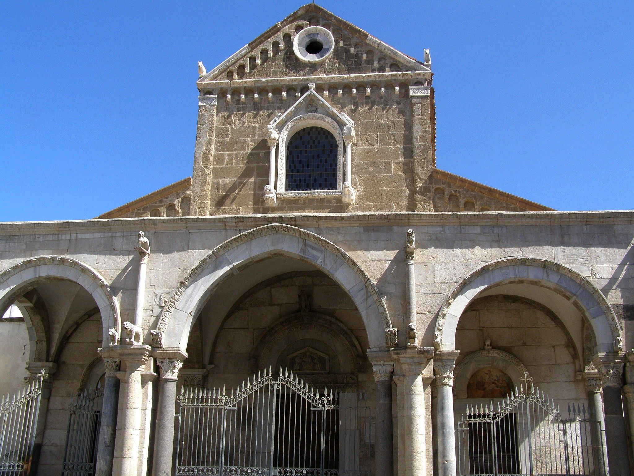 Sessa Aurunca - priečelie románskej Katedrály Santi Pietro e Paolo